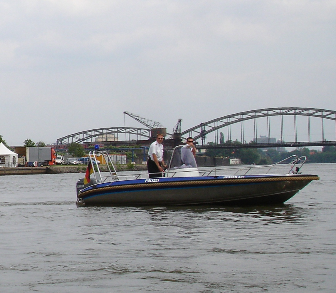 Boot der Wasserschutzpolizei Hessen (Deutschland) auf dem Main bei Frankfurt / Boat from the River Police Hesse (Germany) on the river Main next to Frankfurt